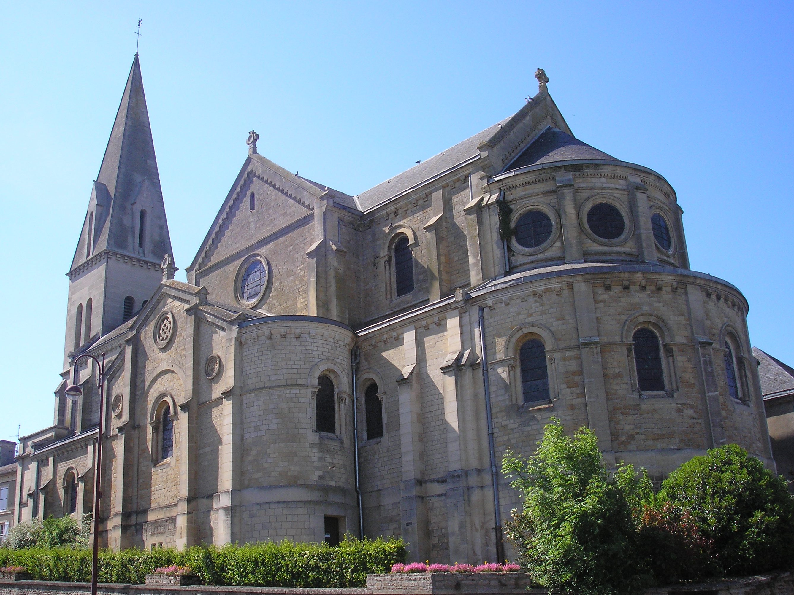 Troarn (Normandie, France). L'église Sainte-Croix.